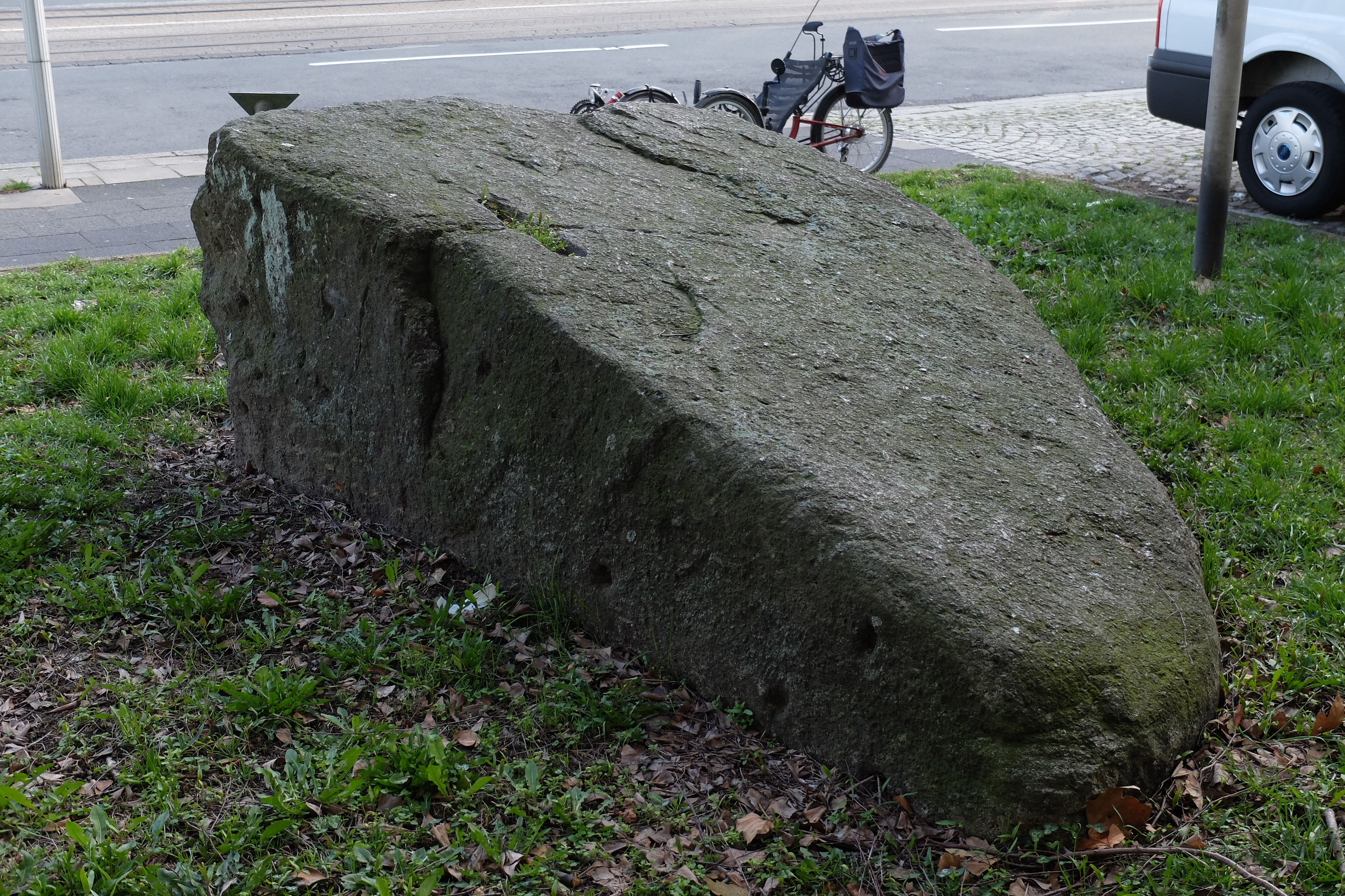 Als Naturdenkmal geschützter Granit-Findling in Essen – ND-Nr. 23 an der Mülheimer Straße 126 (Realschule Essen-West), 1 Findling (3,00 m x 2,00 m x 1,00 m, Revsund-Granit; Informationsquelle: Essener Naturdenkmalbroschüre)